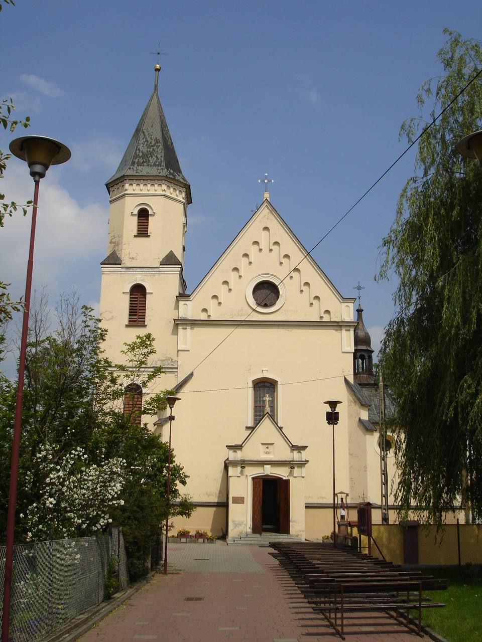 gotycki klasztor karmelitów, pierwotnie augustianów z 1403 r., ( przebudowywany )